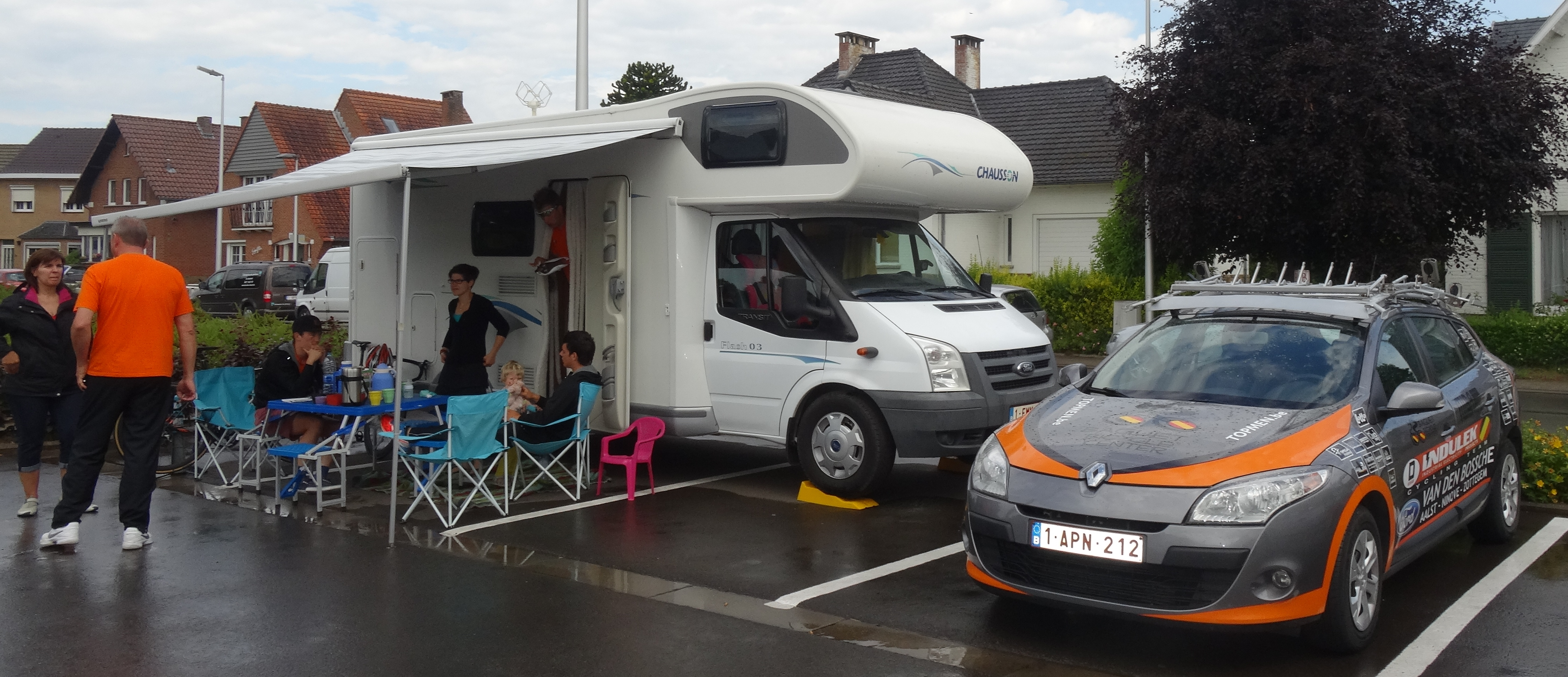 Reportage photographique réalisé le dimanche 8 juin à l'occasion du départ du Mémorial Philippe Van Coningsloo 2014 à Wavre, Belgique.